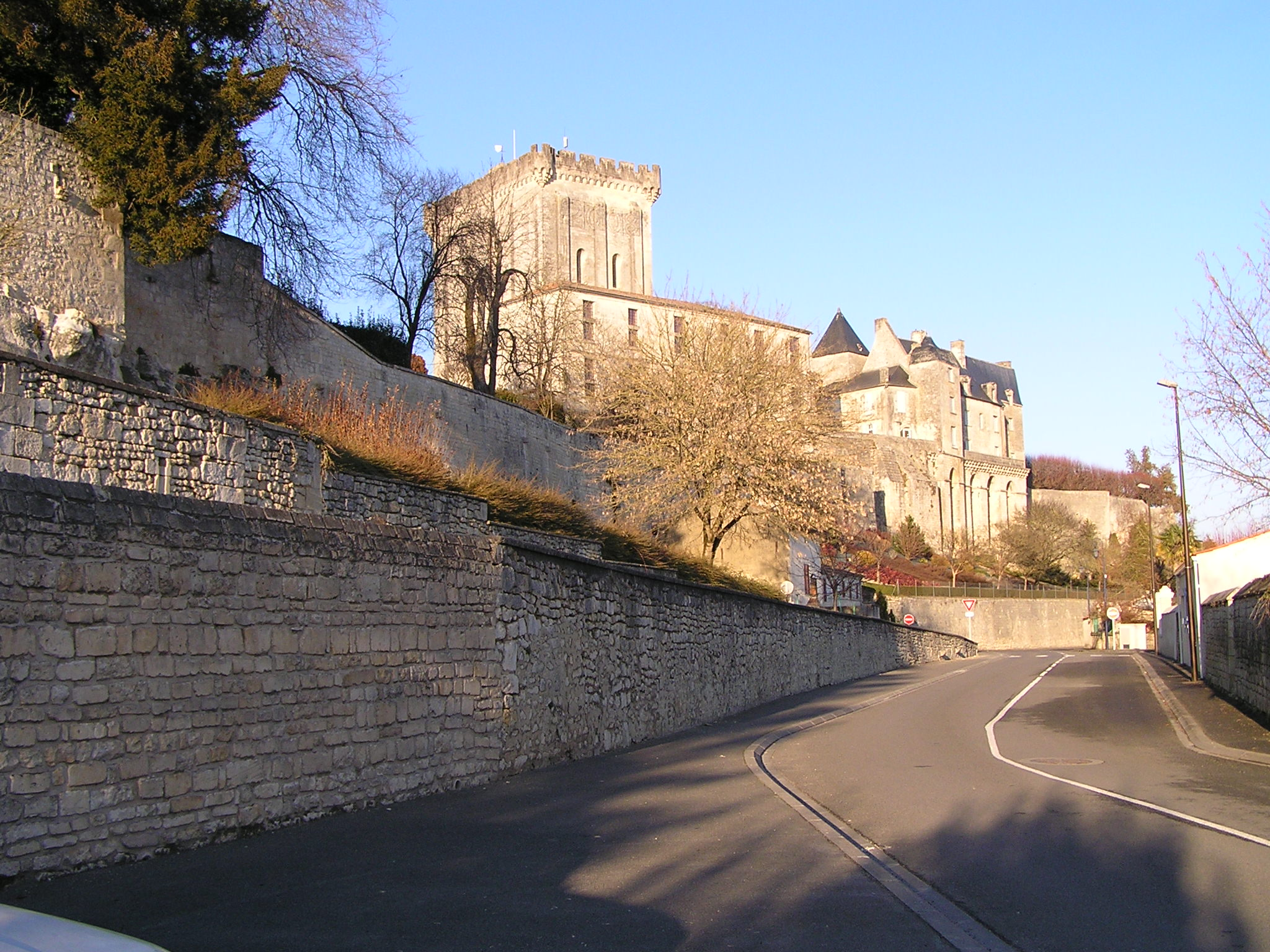 Pons en Charente maritime et son château